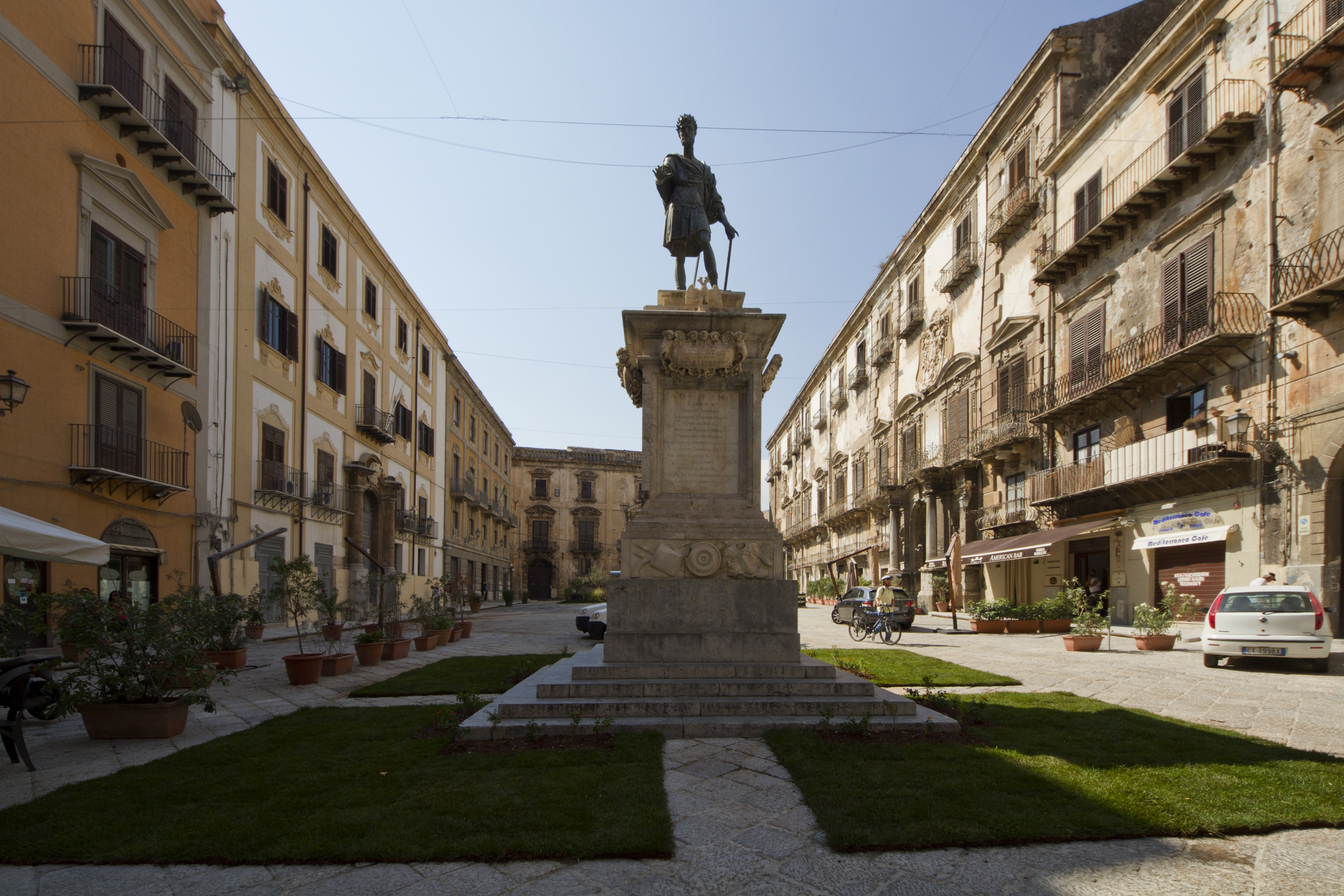 Piazza Bologni - Carlo V, Albergaria, Palermo, Sicily, Italy